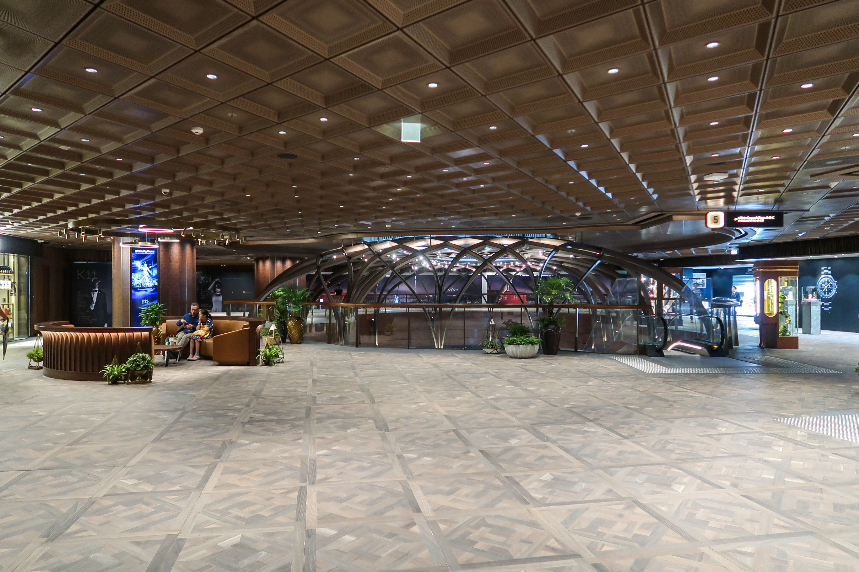 K11 MUSEA Level 5